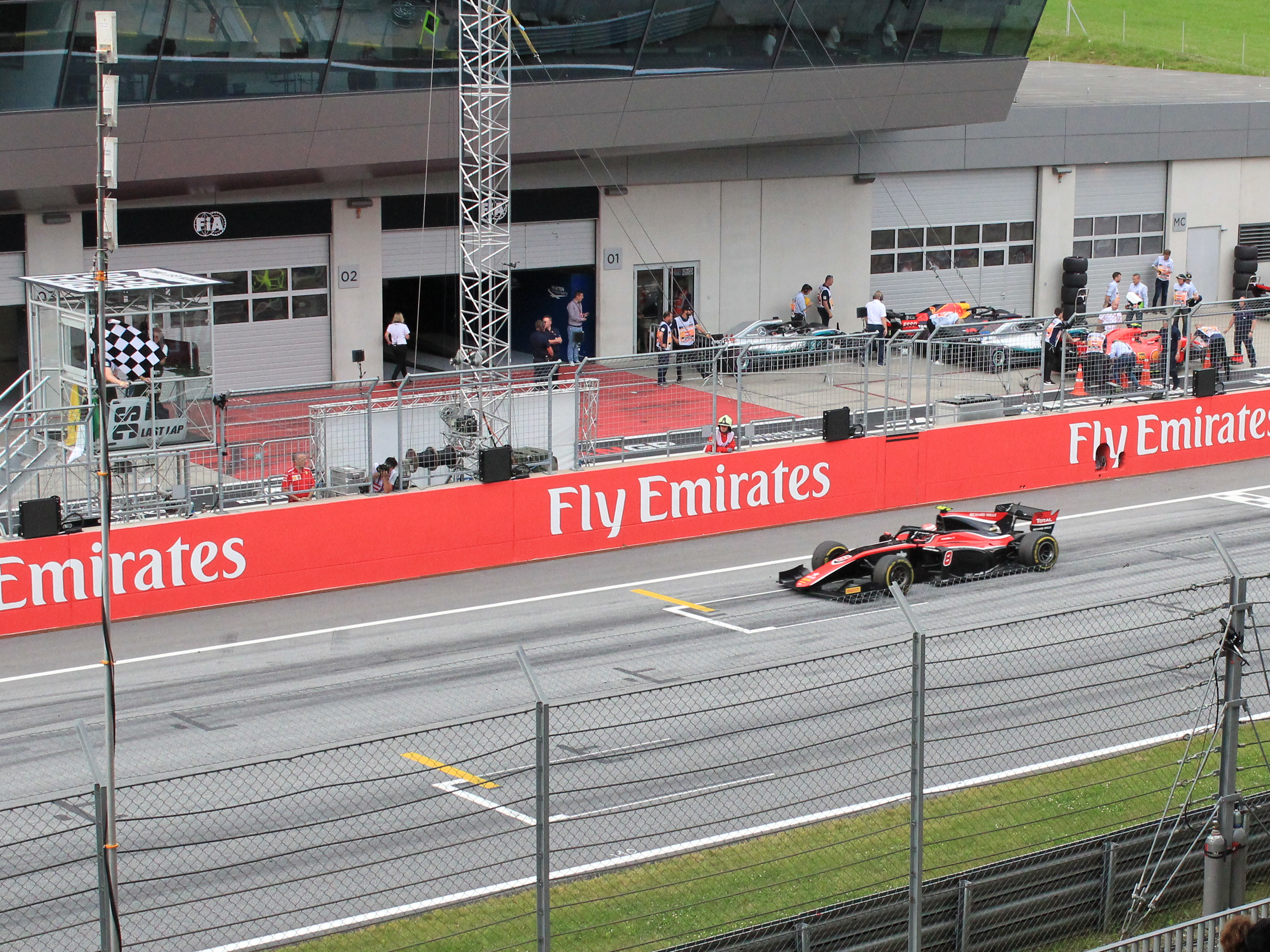 George Russel beim Rennwochenende in Österreich 2018 (Platz 1 im ersten Rennen)